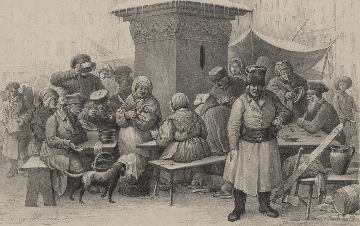 Album cynkograficzno-rysunkowe warszawskie.